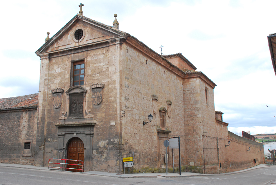 Convento de Santo Domingo, Lerma, Burgos, España